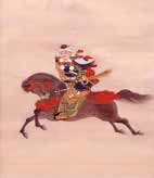 島津運久の肖像。